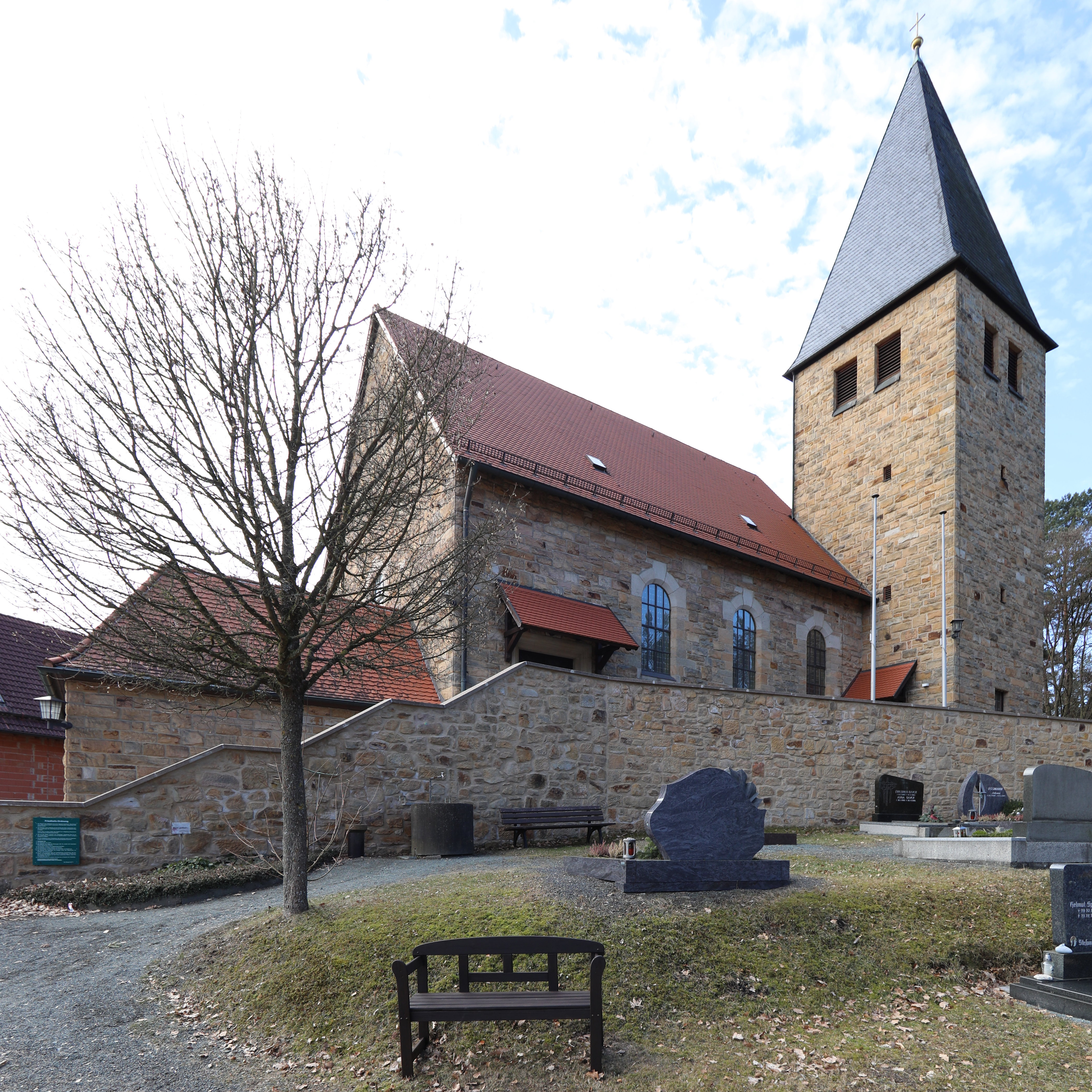 katholische Filialkircche St. Josef in Thonberg